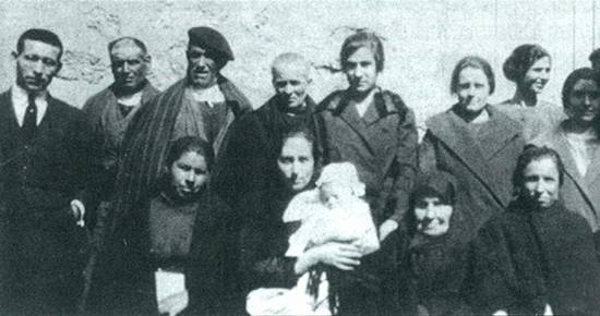 Simón Vicente (izquierda), el último pastor protestante, junto a algunos de sus feligreses.